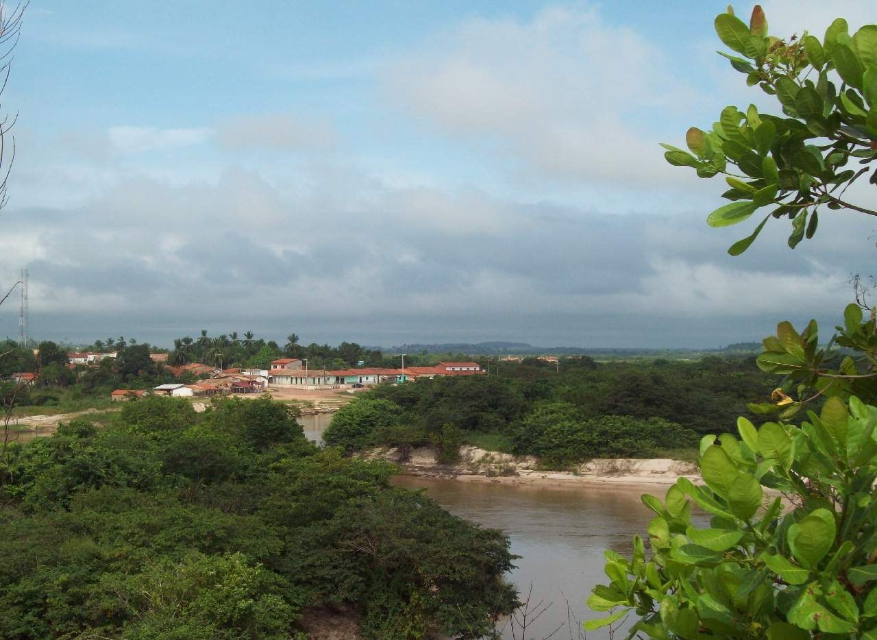 A cidade de Alto Alegre do Pindaré ao lado do rio Pindaré, Maranhão Brasil.